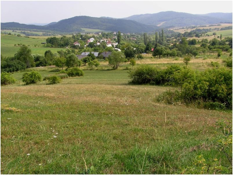 Celkový pohľad